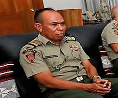 Stabschef der Verteidigungskräfte Osttimors Calisto dos Santos (Coliati).